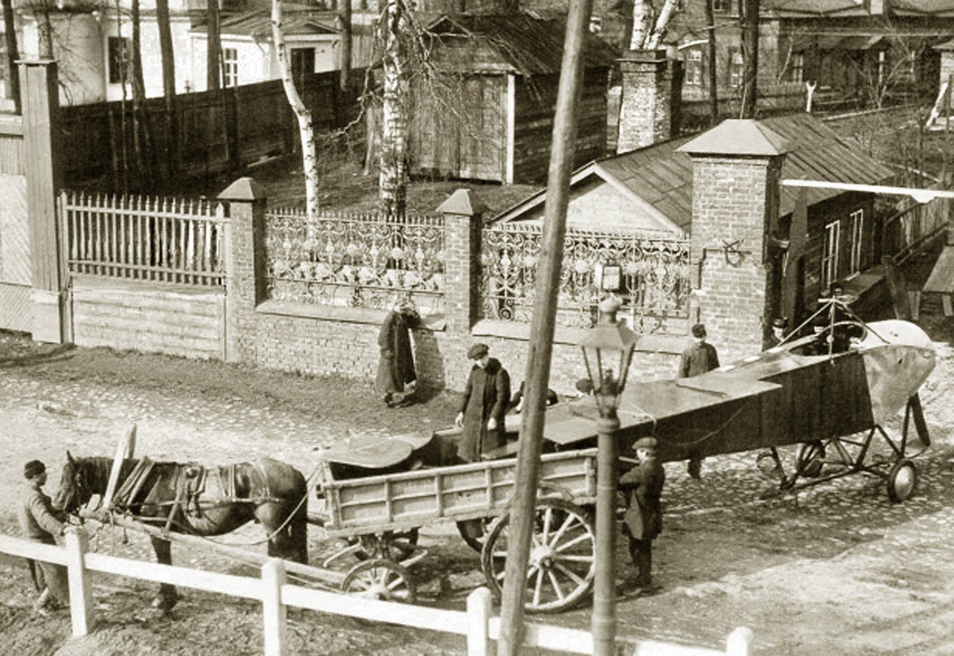 Авиационный отдел Русск-Балтийского вагонного завода в Петербурге Строгановская набережная, д. 1